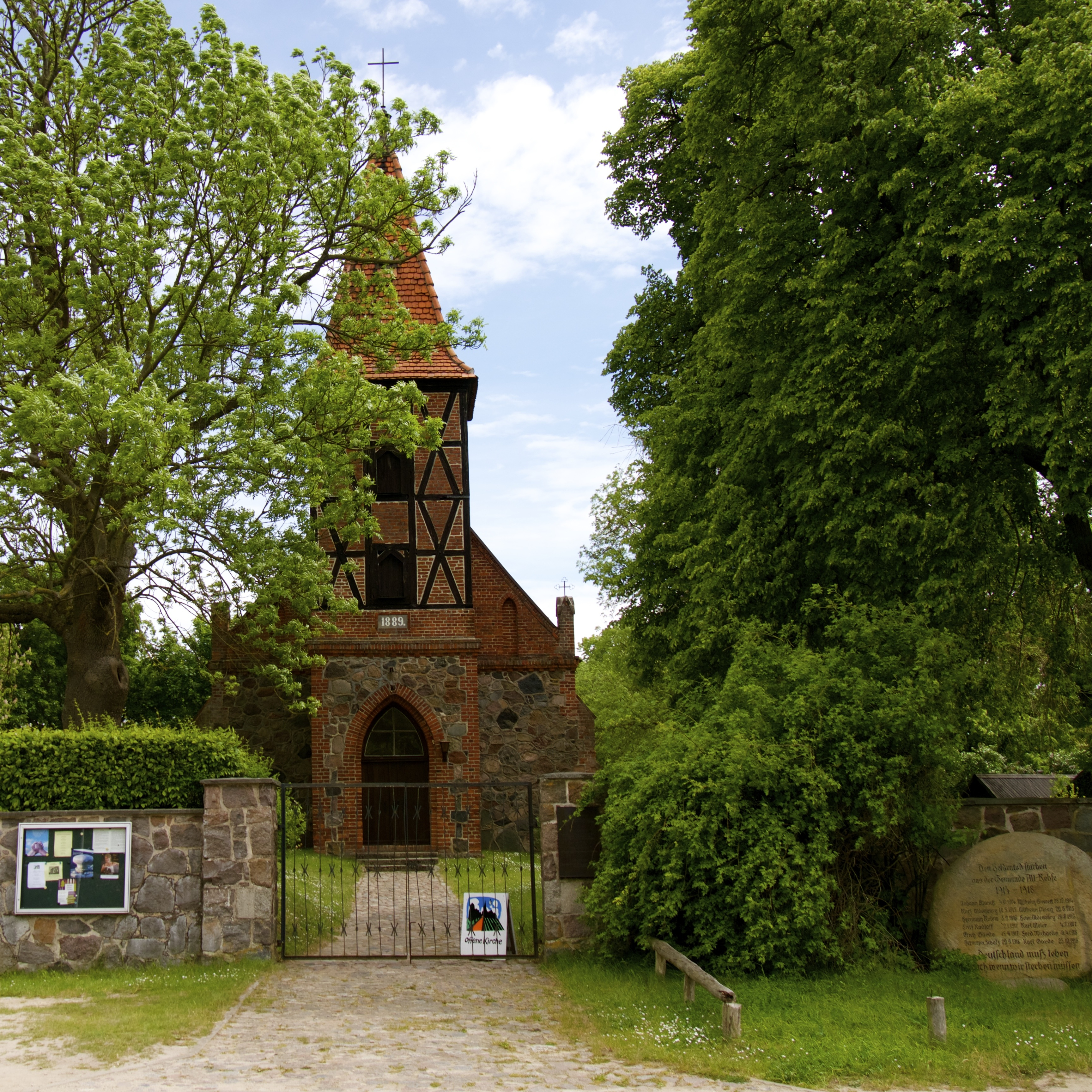 Kirche in Alt Rehse.